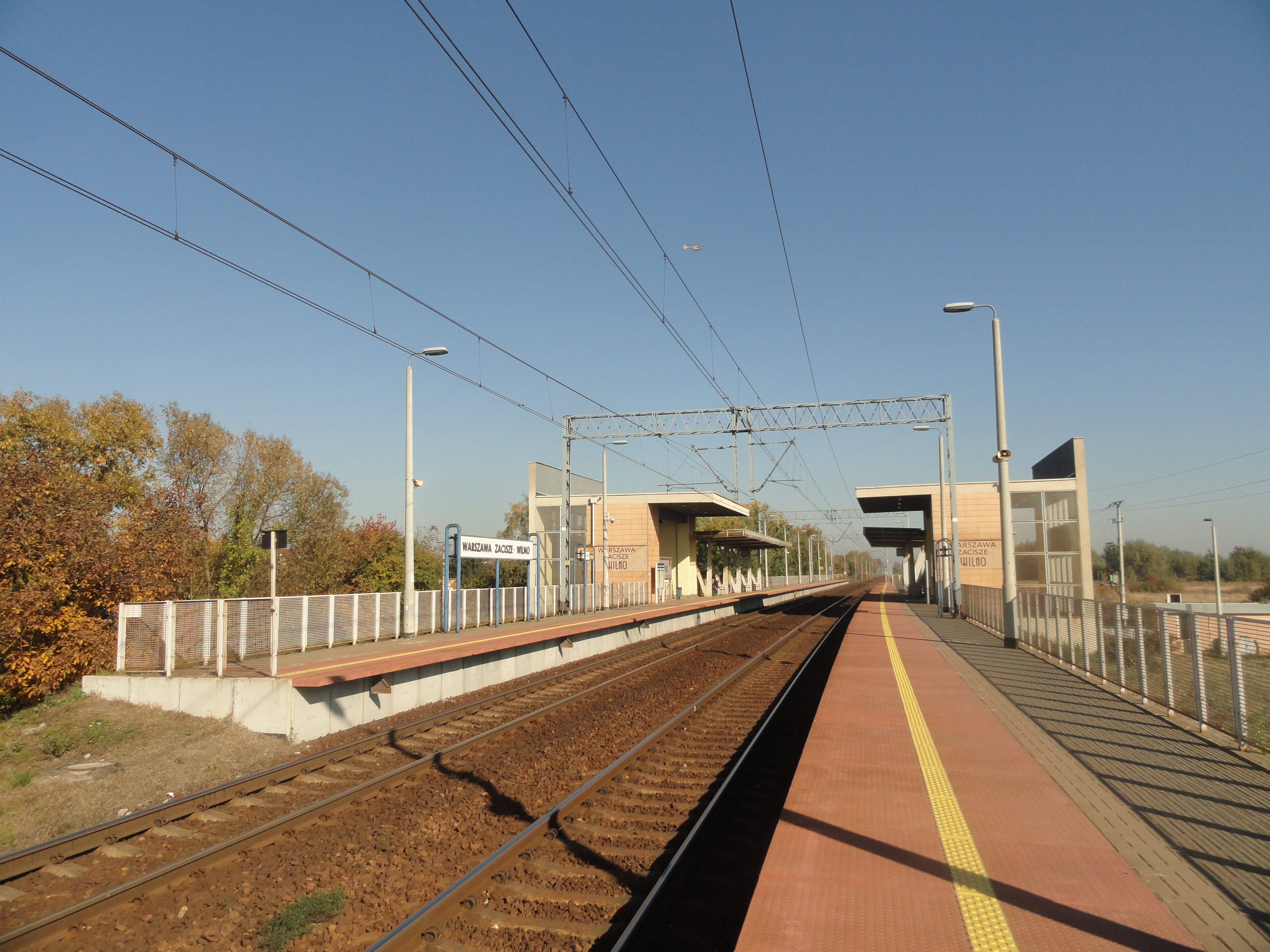 Przystanek osobowy Warszawa Zacisze Wilno.